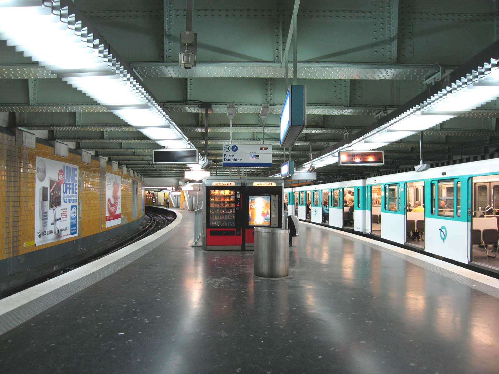 Métro de Paris, Station Nation (ligne 2), Paris, France